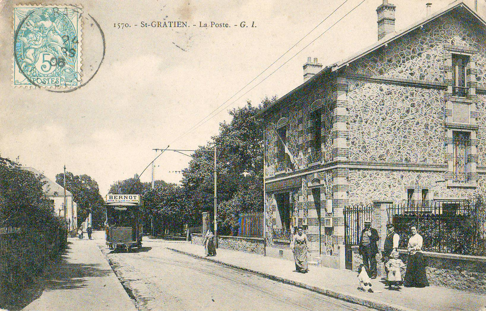 Carte postale ancienne éditée par GI, N°1570SAINT-GRATIEN (Val-d'Oise, Île-de-France, France) : La posteVue en gros plan du Tramway Enghien - Montmorency en train de négocier son virage en plein milieu de la rue